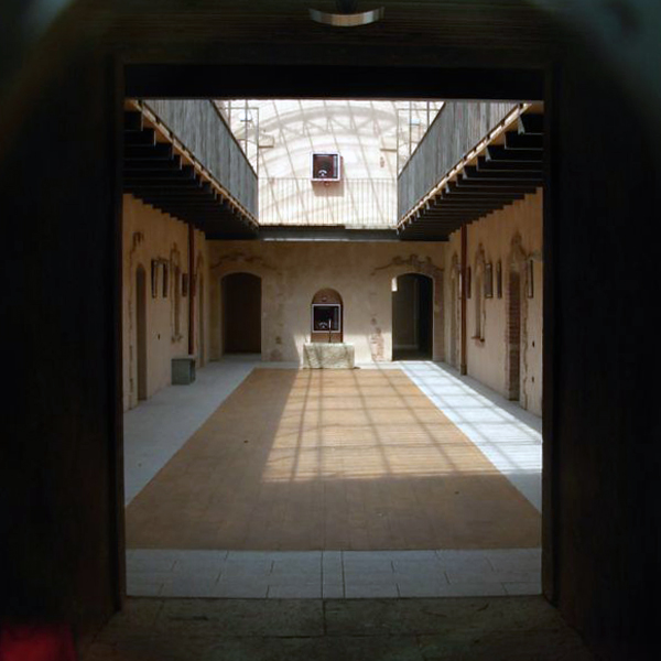 Interno dopo il restauro del Forte di Machaby, Arnad, Valle d'Aosta, Italia.